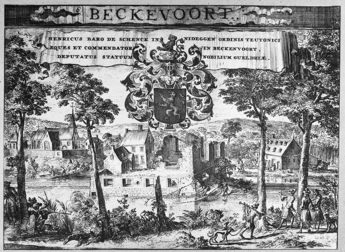 Ets/ Kasteel: Ets met kasteel (opmerking: Ets door Rom. de Hooghe in prentenkabinet van de Abdij Godsdal (Val Dieux) te Aubel (België))